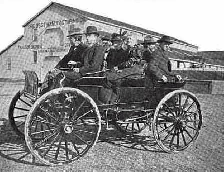 1898 experimental vehicle by the Best Mfg. Co of San Leandro, CA, for a planned production. The car had a 2 cylinder gasoline engine with 7 HP. It could carry 8 passengers up to 20 mph. The company is well-kwown for their huge traction engines, and a forerunner of Caterpillar. Only one more car was completed, for personal use of Daniel Best.